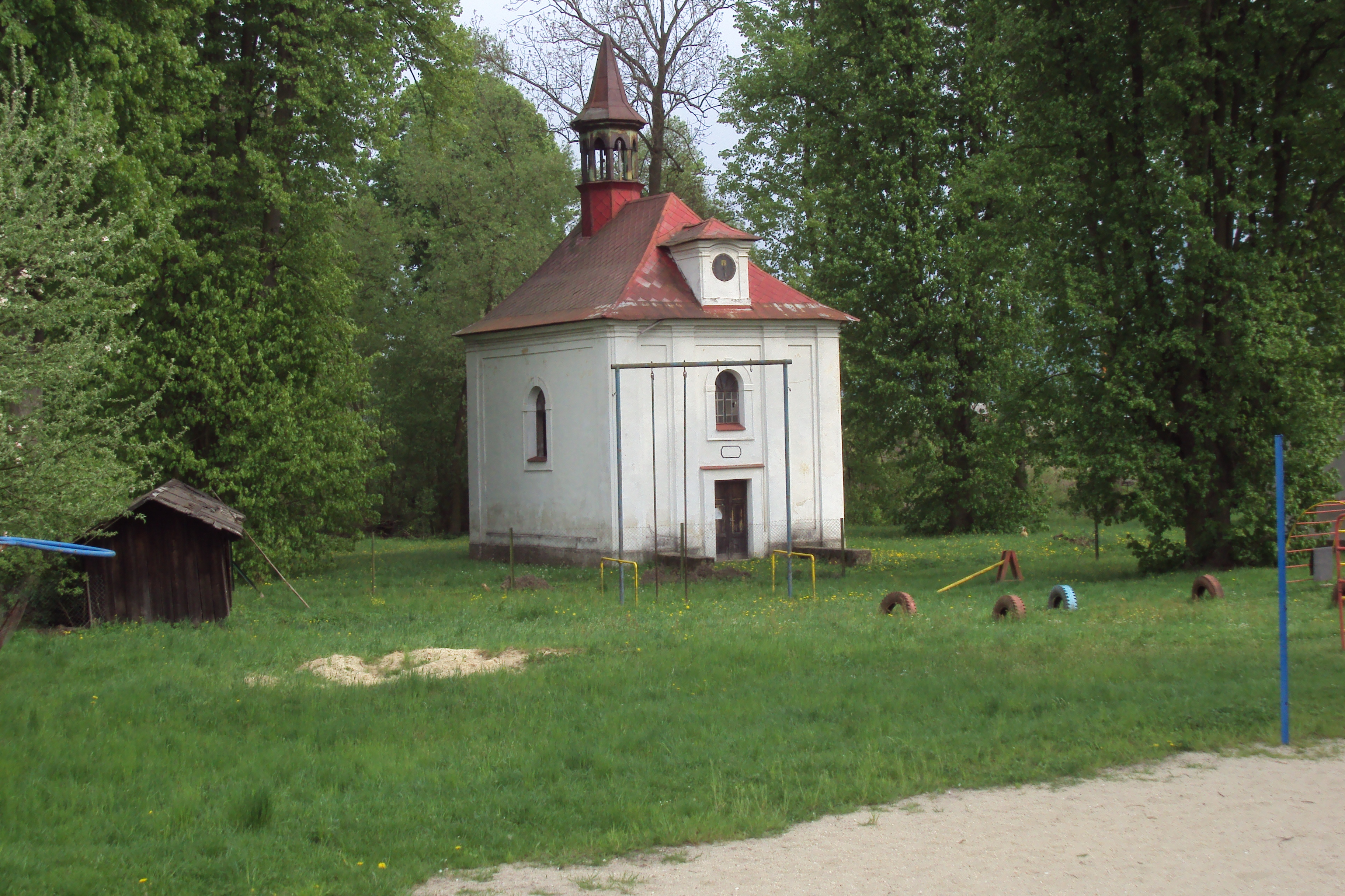 Kaple či minikostel v obci Velký Grunov u Brniště